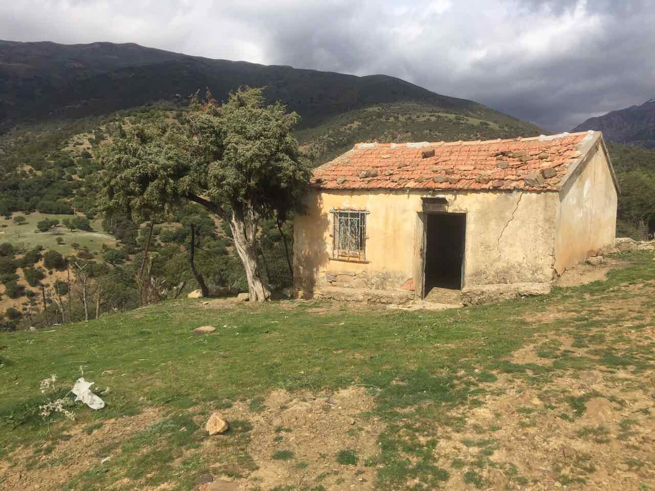 Epicerie de da-Yucef Agouillal